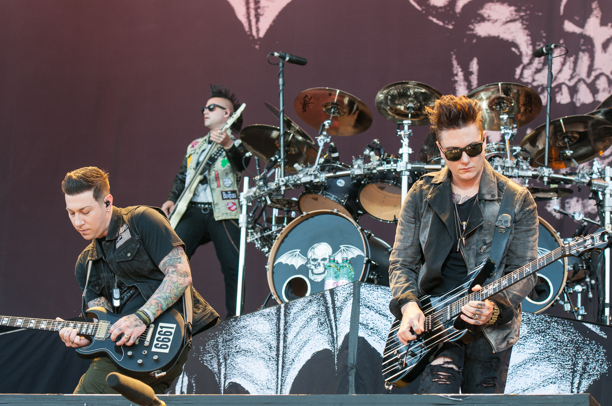 ARGO-Konzerte,Avenged Sevenfold,Brian Elwin Haner Jr.,Johnny Christ,Jonathan Lewis Seward,Konzert,Livekonzert,Livemusik,Musik,RiP,Rock im Park 2014,Synyster Gates,Zachery James Baker,Zacky Vengeance